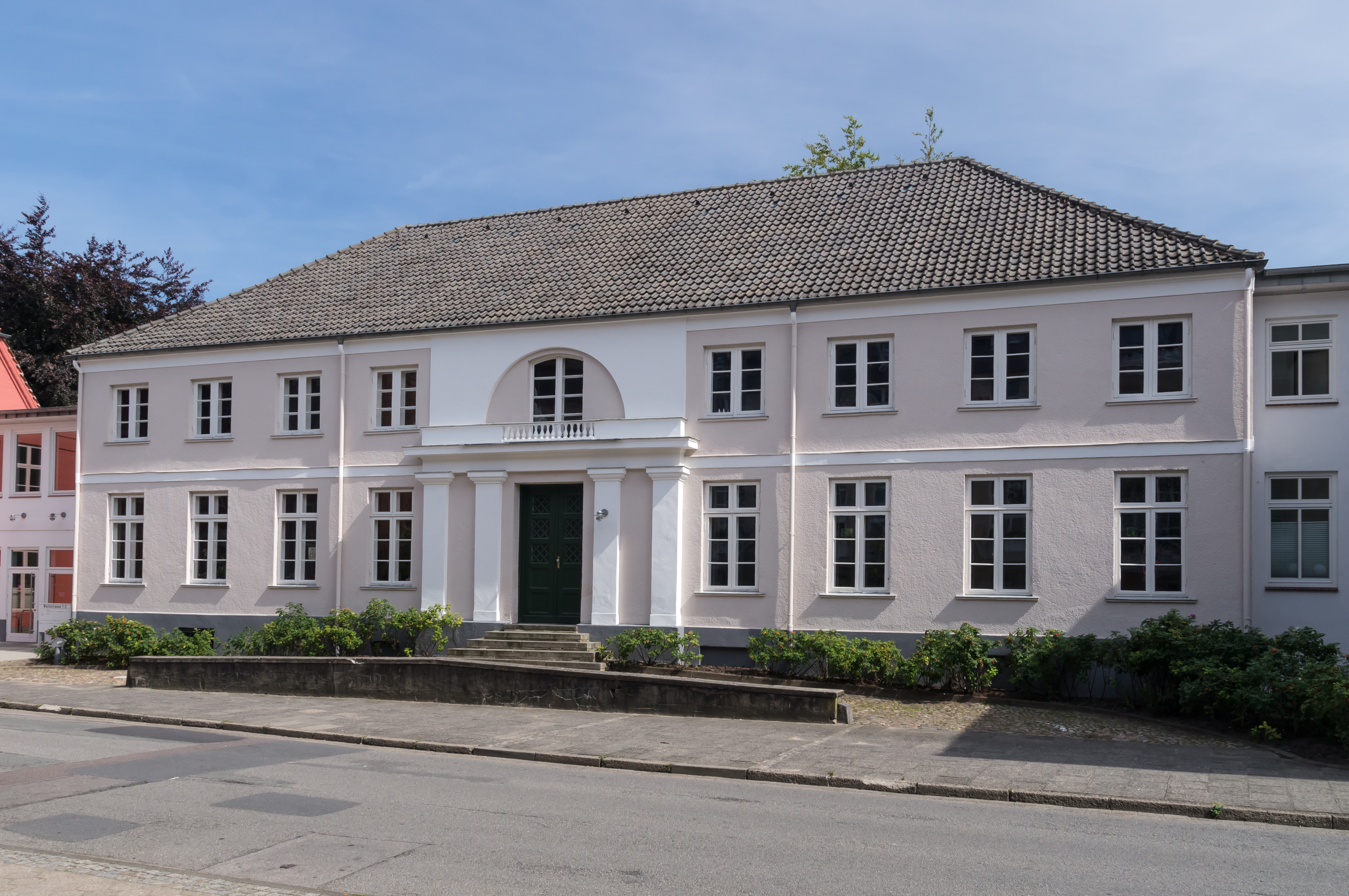 Flensburg-Sandberg; Waitzstraße 3; Neues Amtshaus; Denkmal-Nr. 9